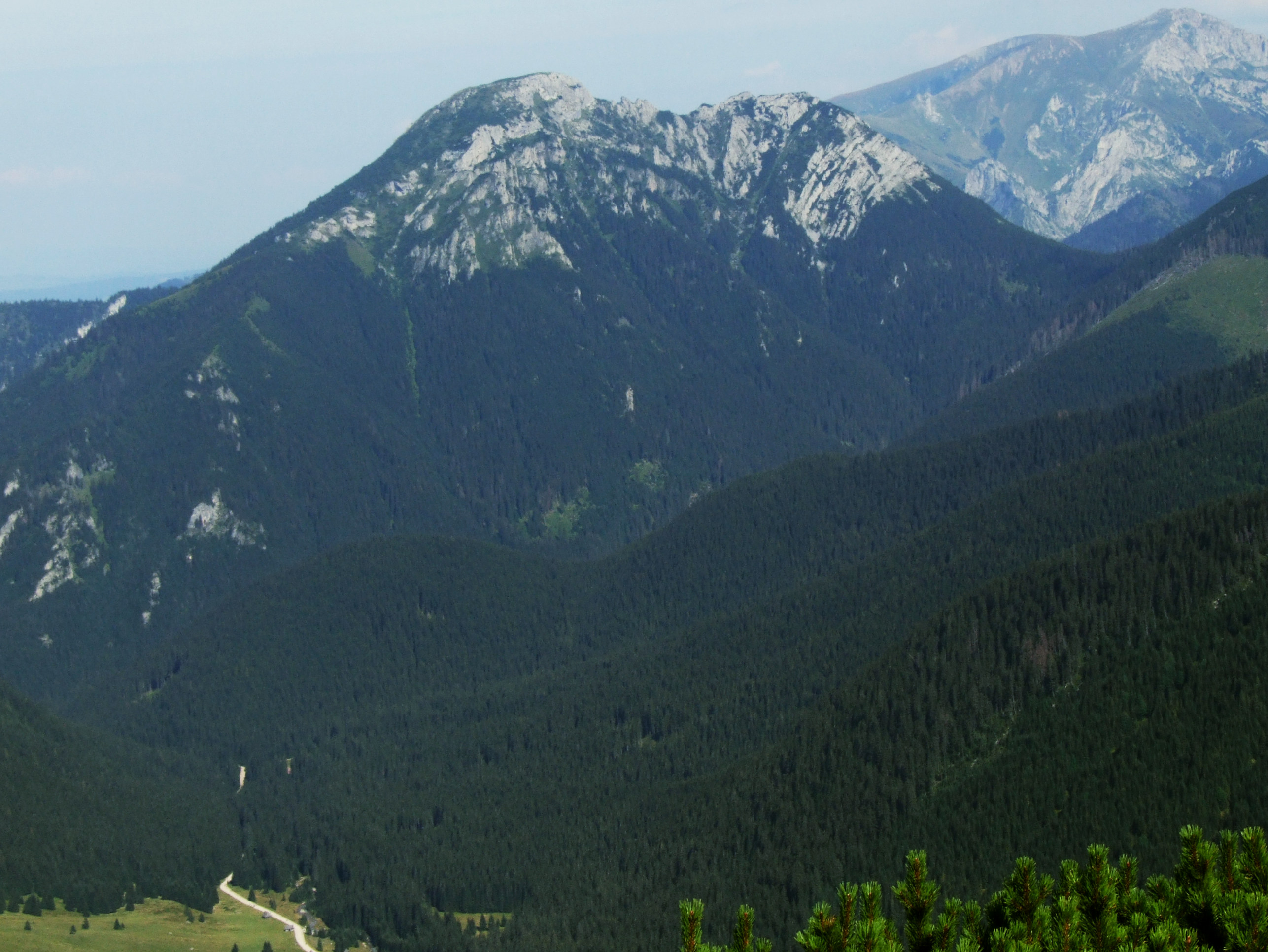 Kominiarski Wierch (West Tatra Mountains)